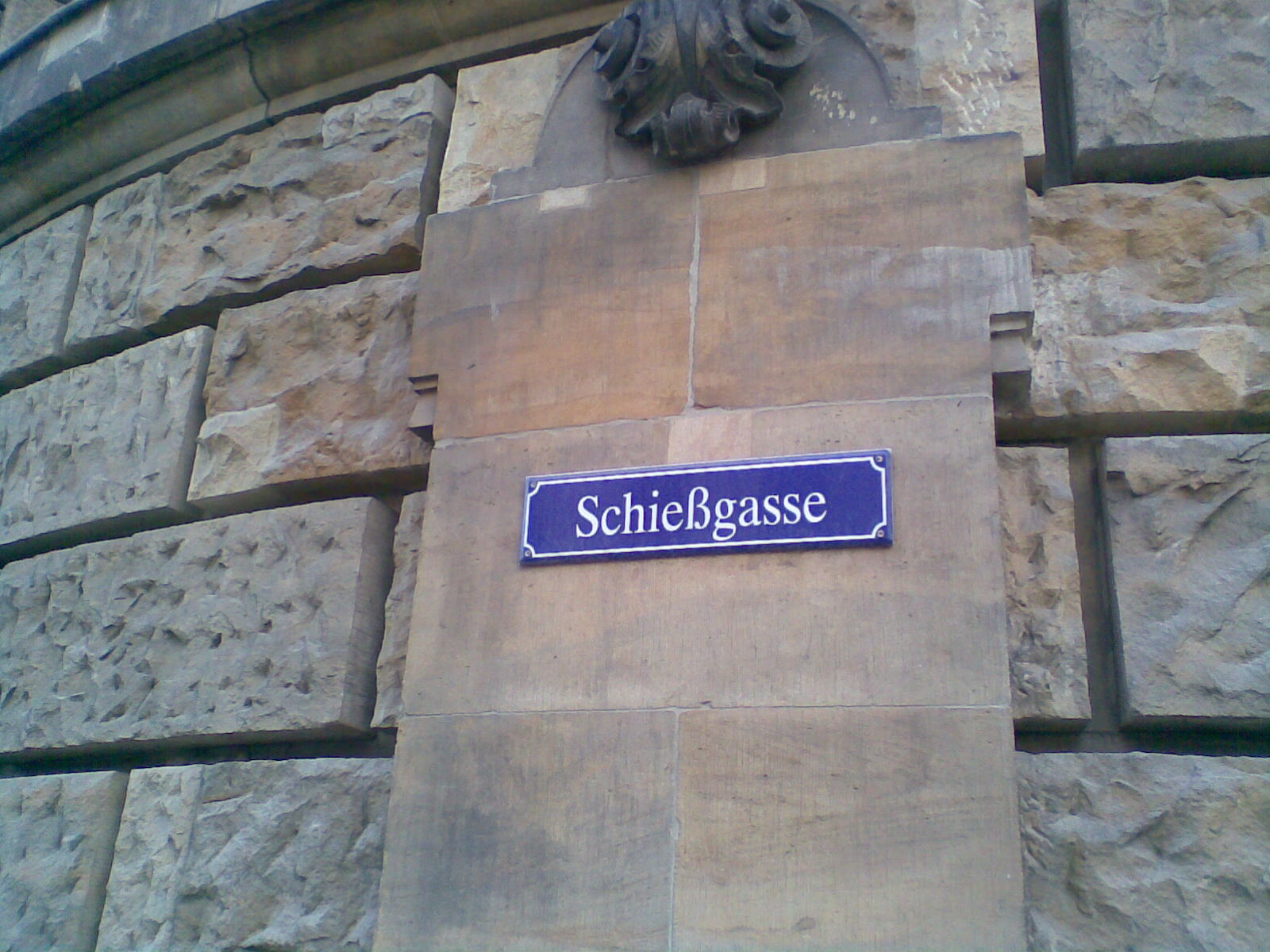 Die Schießgasse ist eine zentralgelegene Straße im Stadtbezirk Altstadt von Dresden. Im Bild das blaue Straßenschild mit weißer Schrift am Eckbau des Polizeipräsidums in die Rampische Straße.